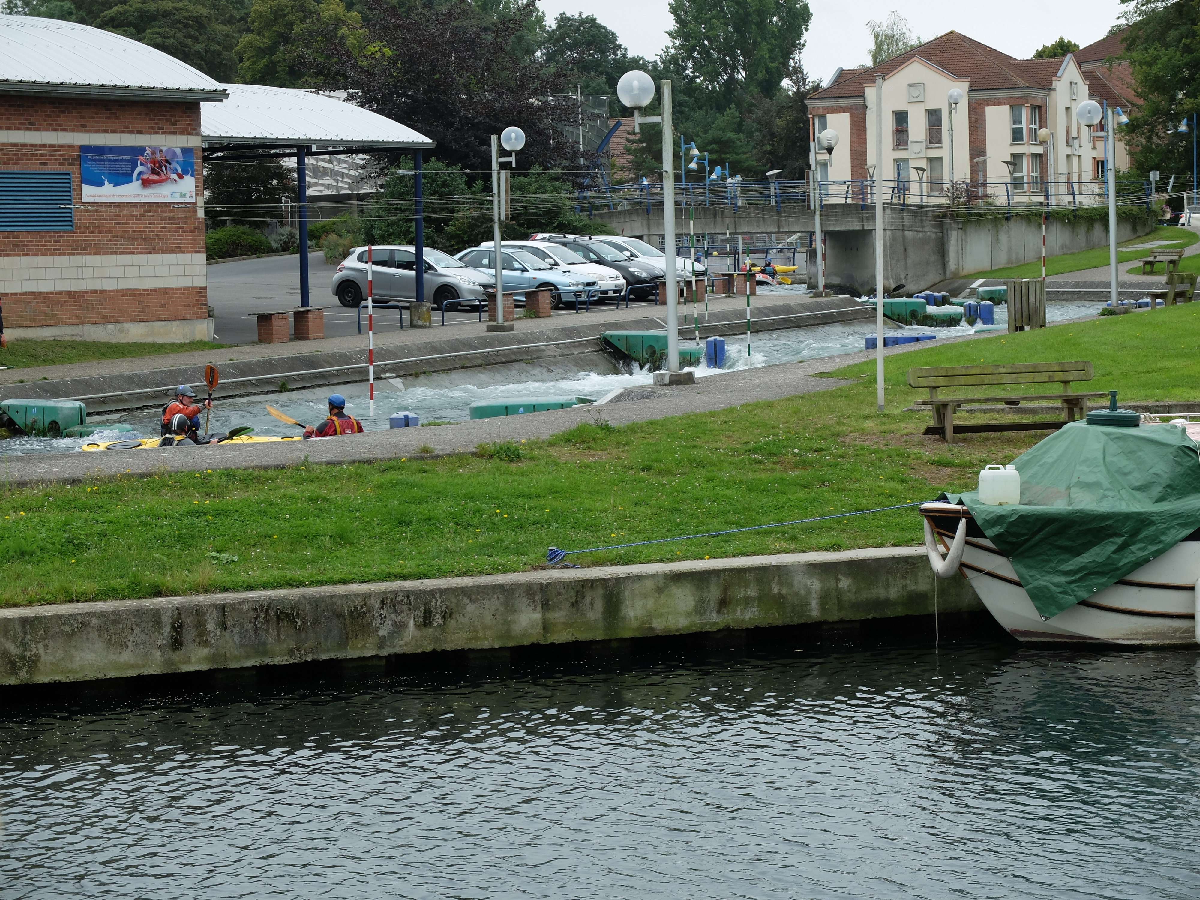 Vue de la base nautique de Saint-Laurent-Blangy.